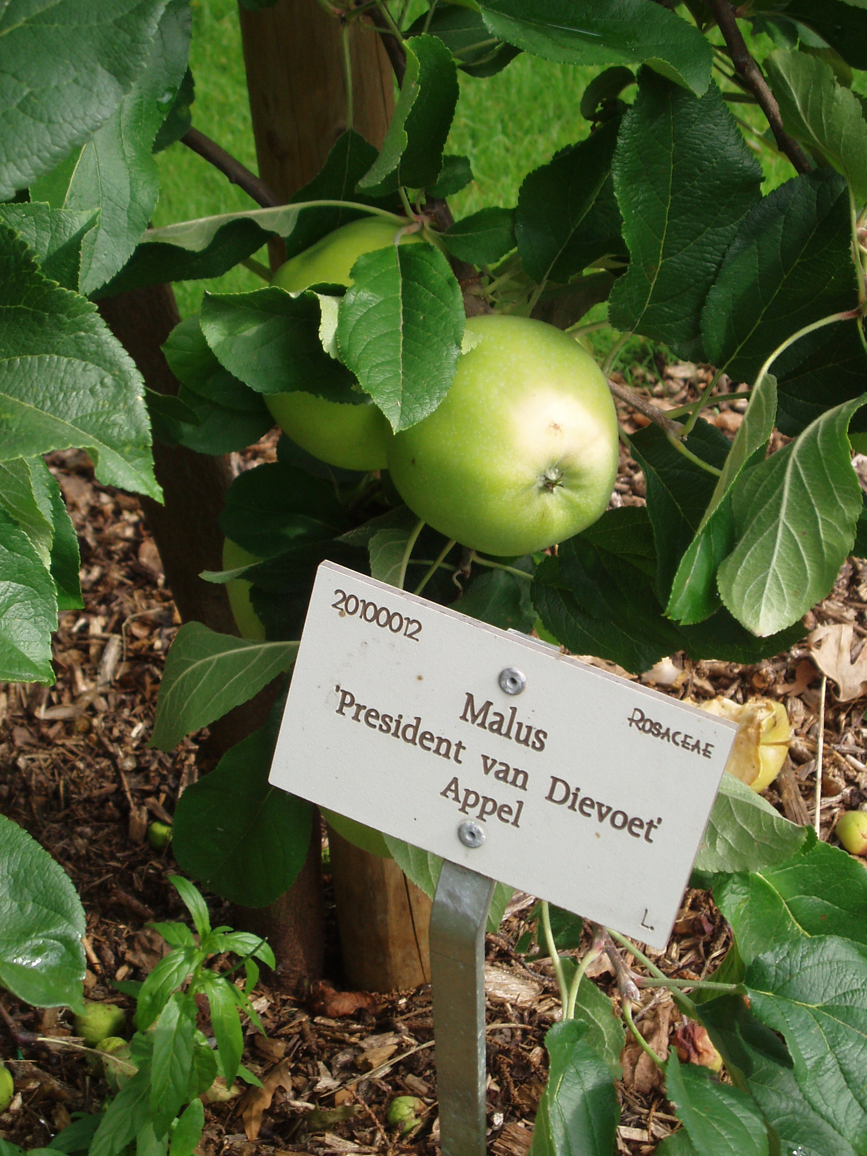 President van Dievoet apple